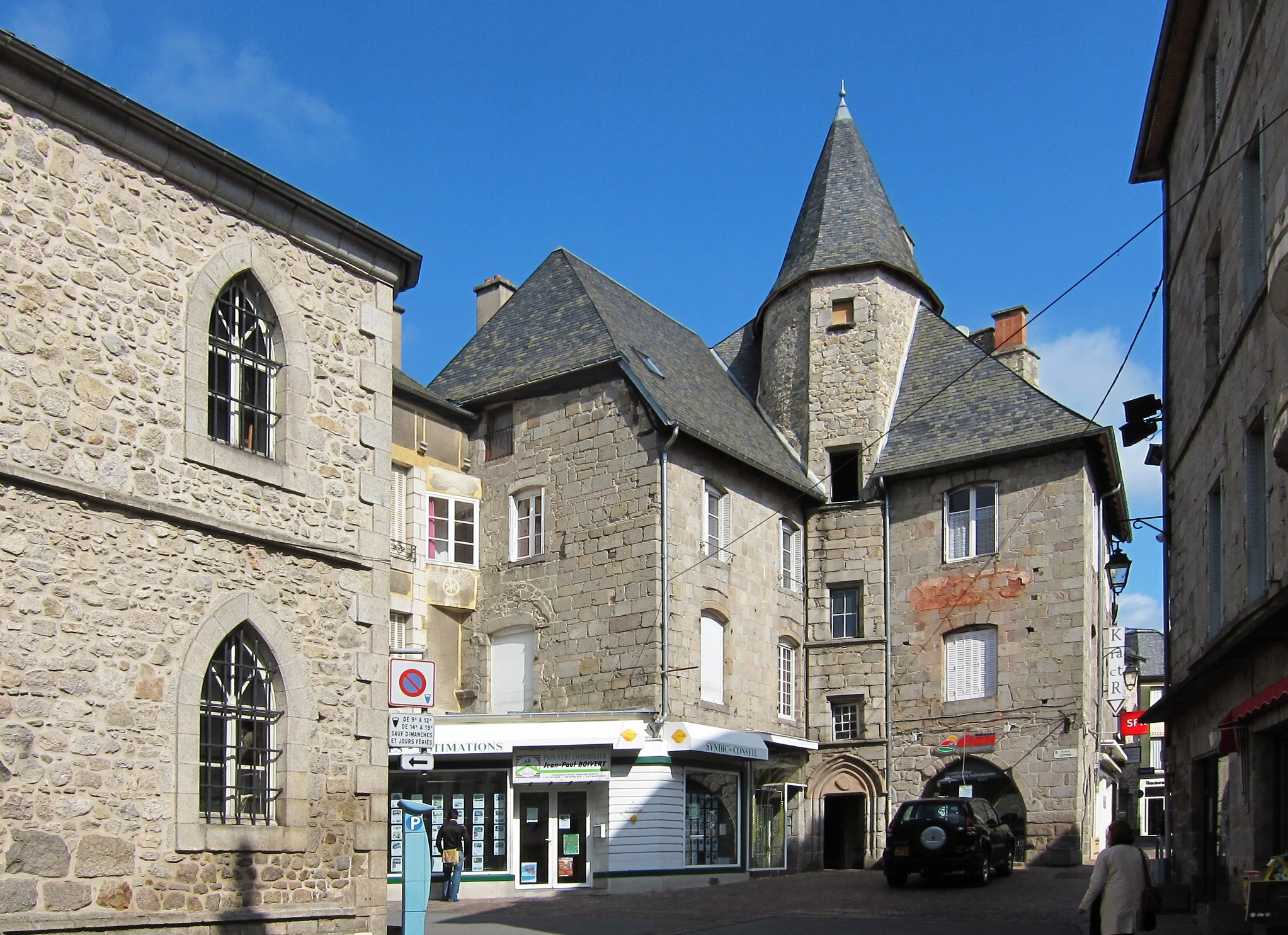 La place Joffre à Ussel (Corrèze).